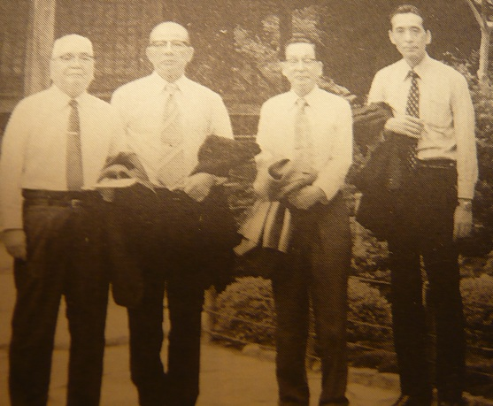 青木 大吉は、税理士、公認会計士。大日本帝国海軍の軍人。